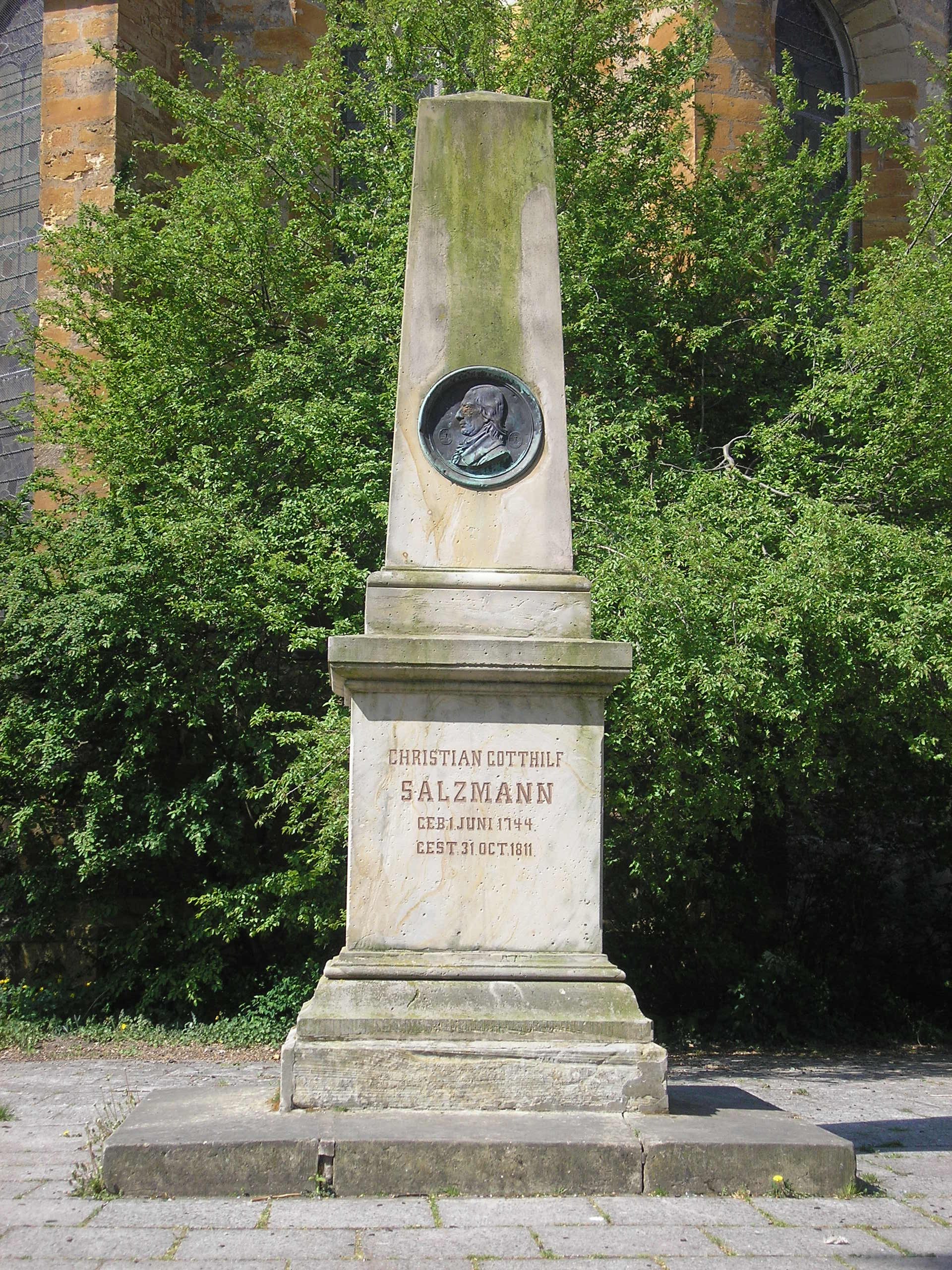 Das Salzmanndenkmal in Sömmerda (Thüringen).